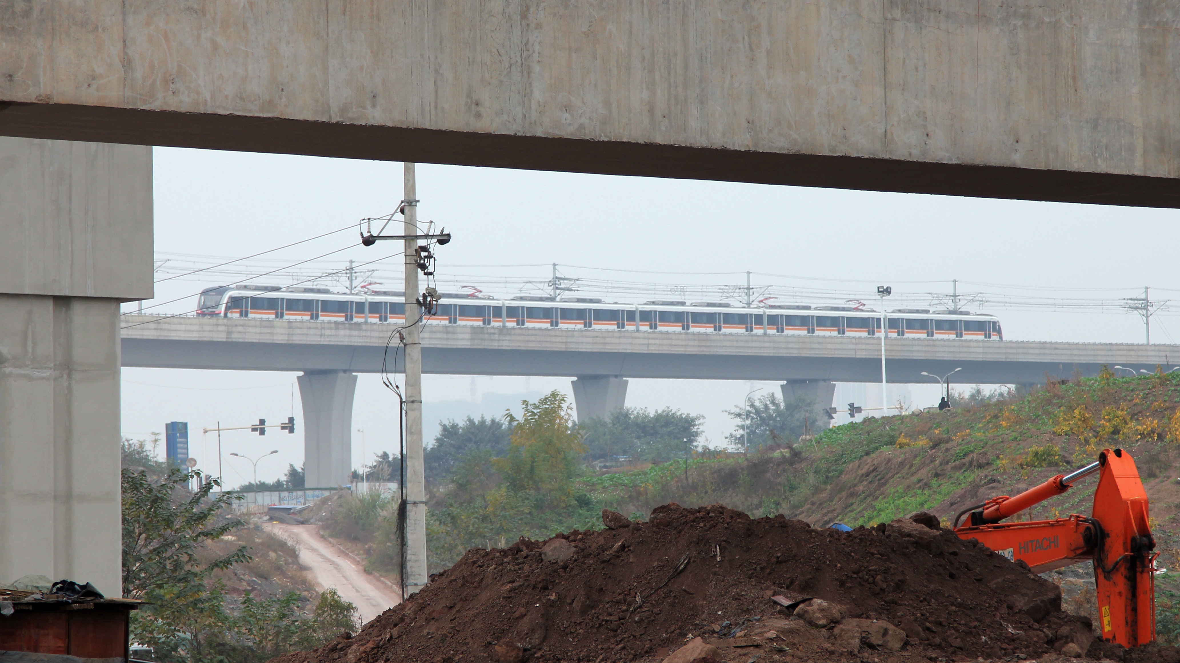 中文（中国大陆）: 重庆轨道交通4号线列车